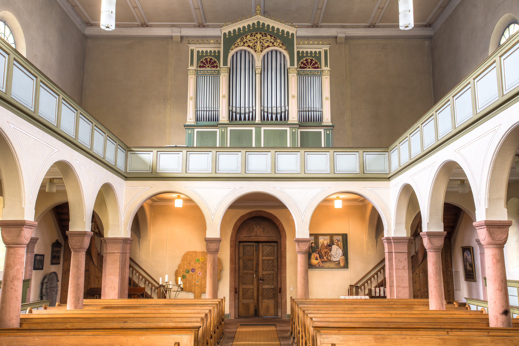 Evangelische Kirche Steinbach, Gemeinde Fernwald, Landkreis Gießen in Hessen, Deutschland